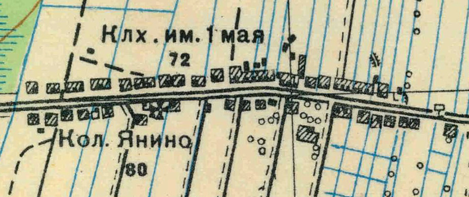 Топографическая карта Ленинградской области, квадрат О-36-2-А-а (сл. Ржевская), деревня Янино-1